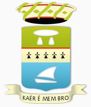 Inspiré du blason créé par Jean-Baptiste Corlobé